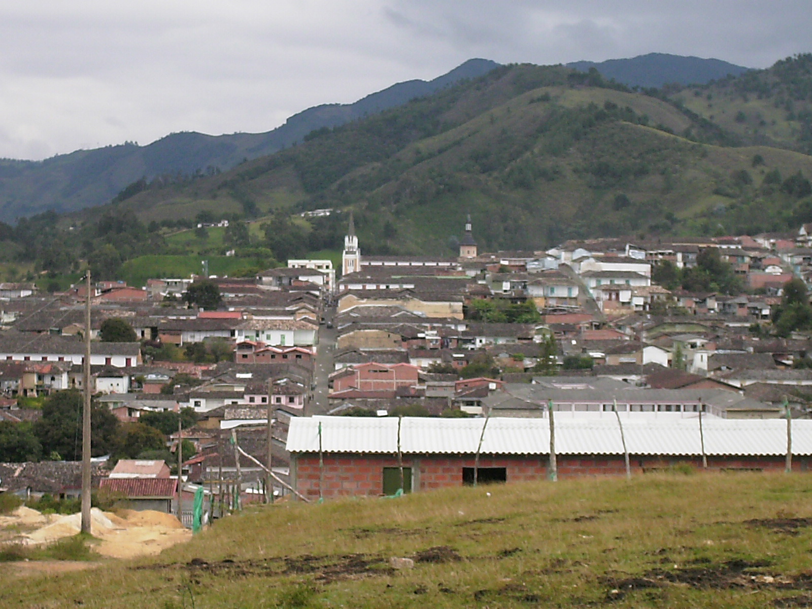 Fotografía Abejorral